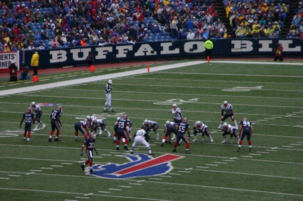 David L Selby 10/22/2006 Pittsford NY